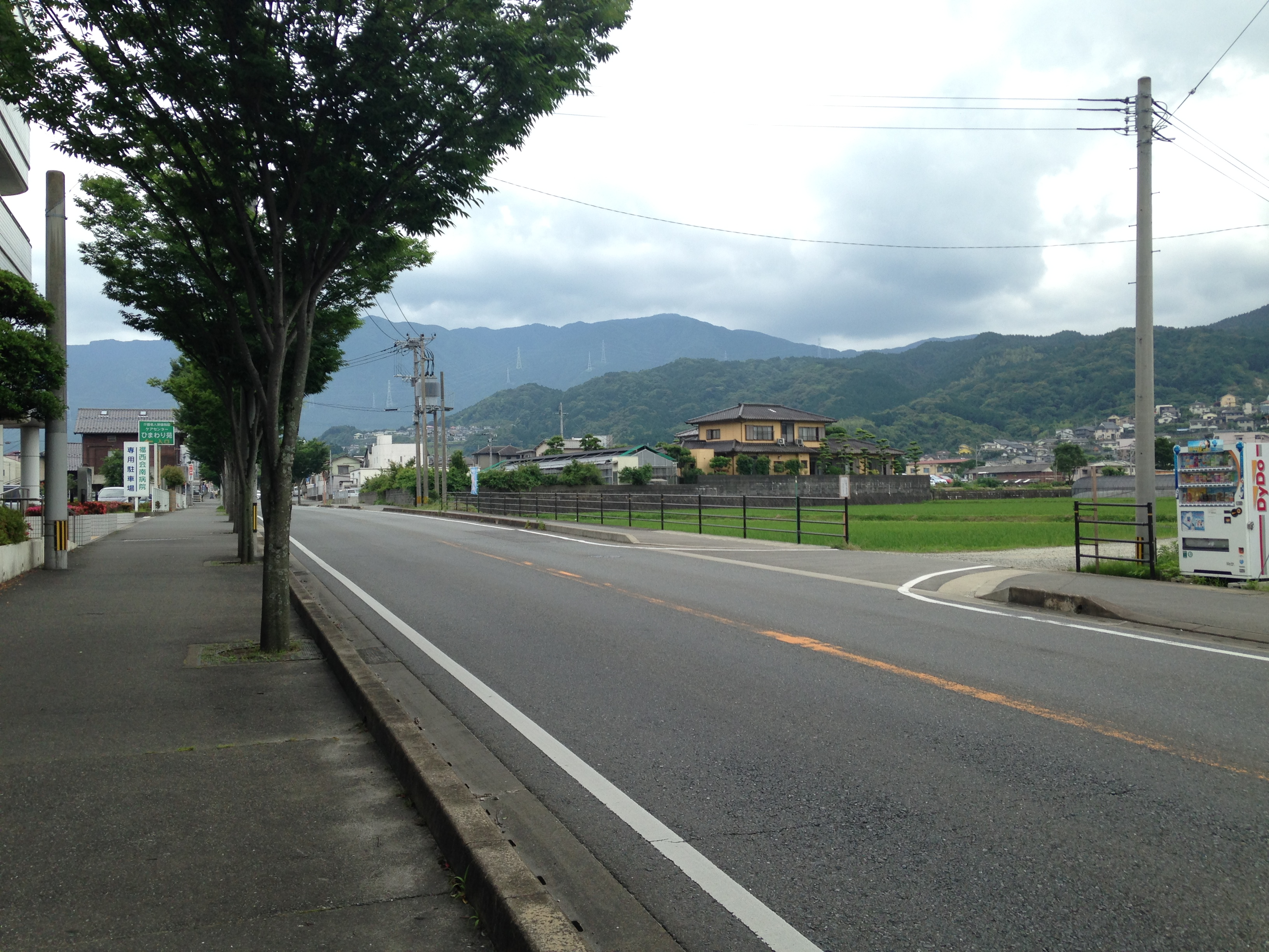 福西会南病院付近を通る国道263号